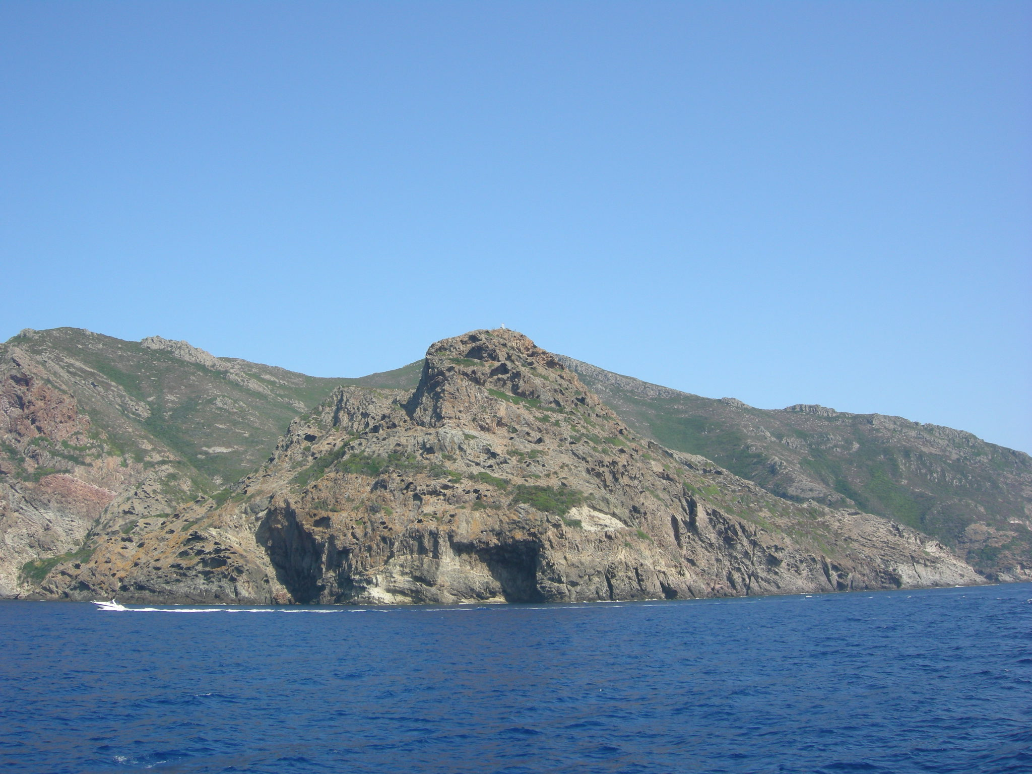 Capraia, giro periplo 99.10 punta del trattoio